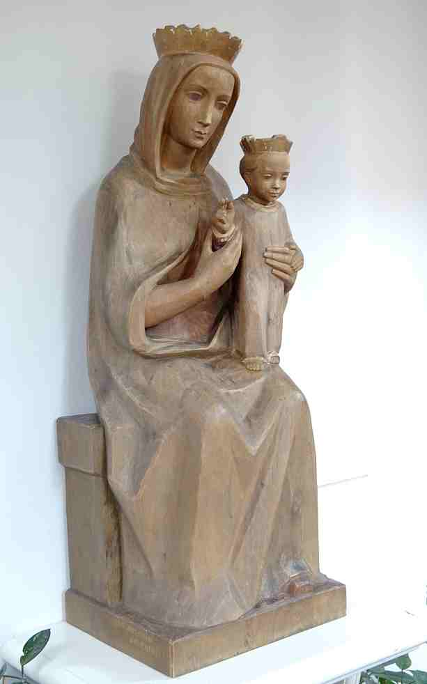 Heilig-Geist-Kirche Bielefeld, Madonnenstatue von Hubert Hartmann (1915-2006)